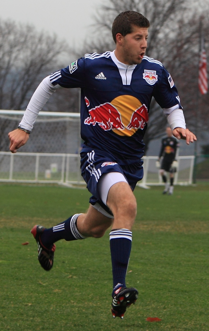 Luke Sassano in March 2010